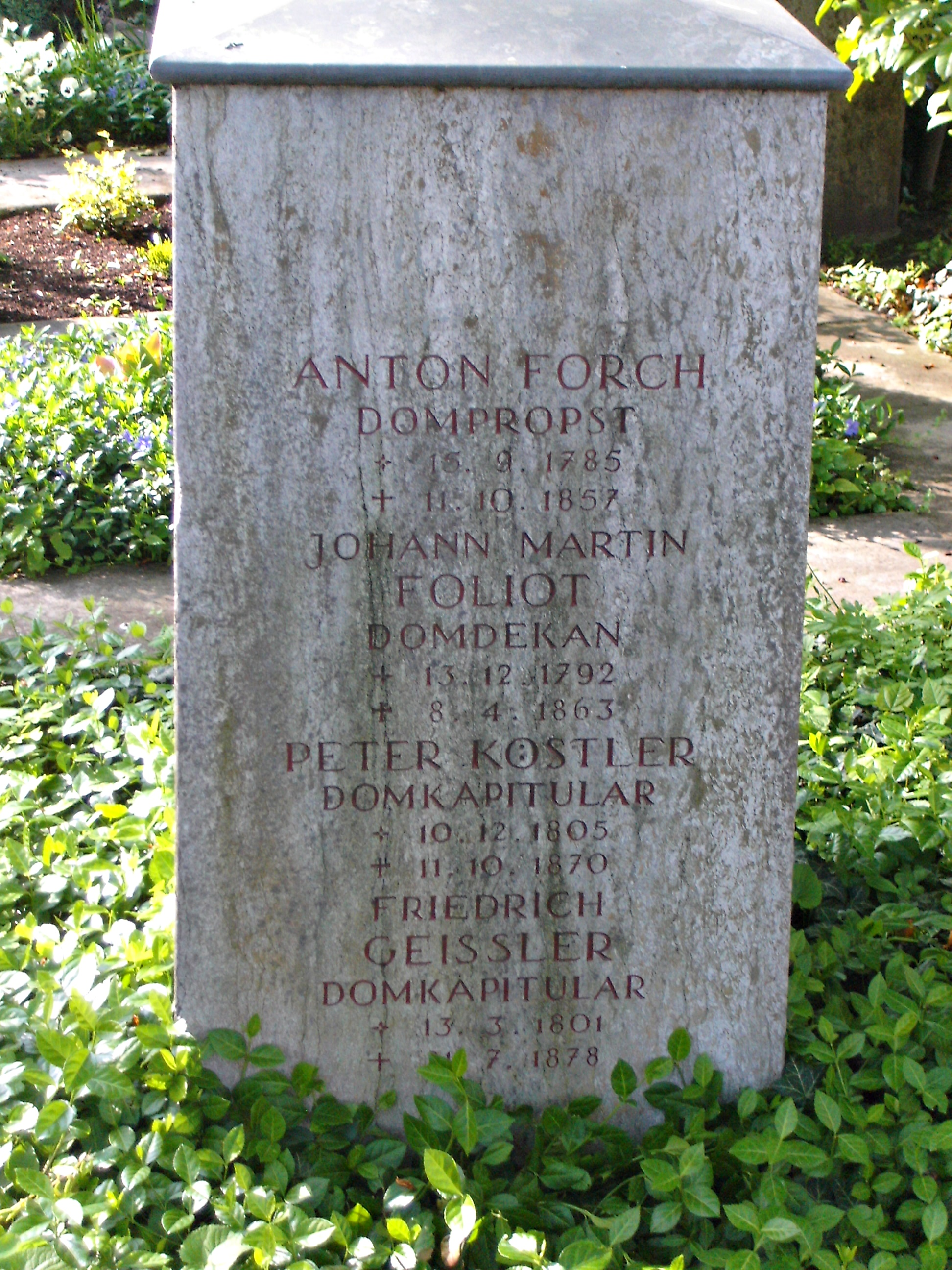 Peter Köstler, Domkapitular Speyer, Grabstein